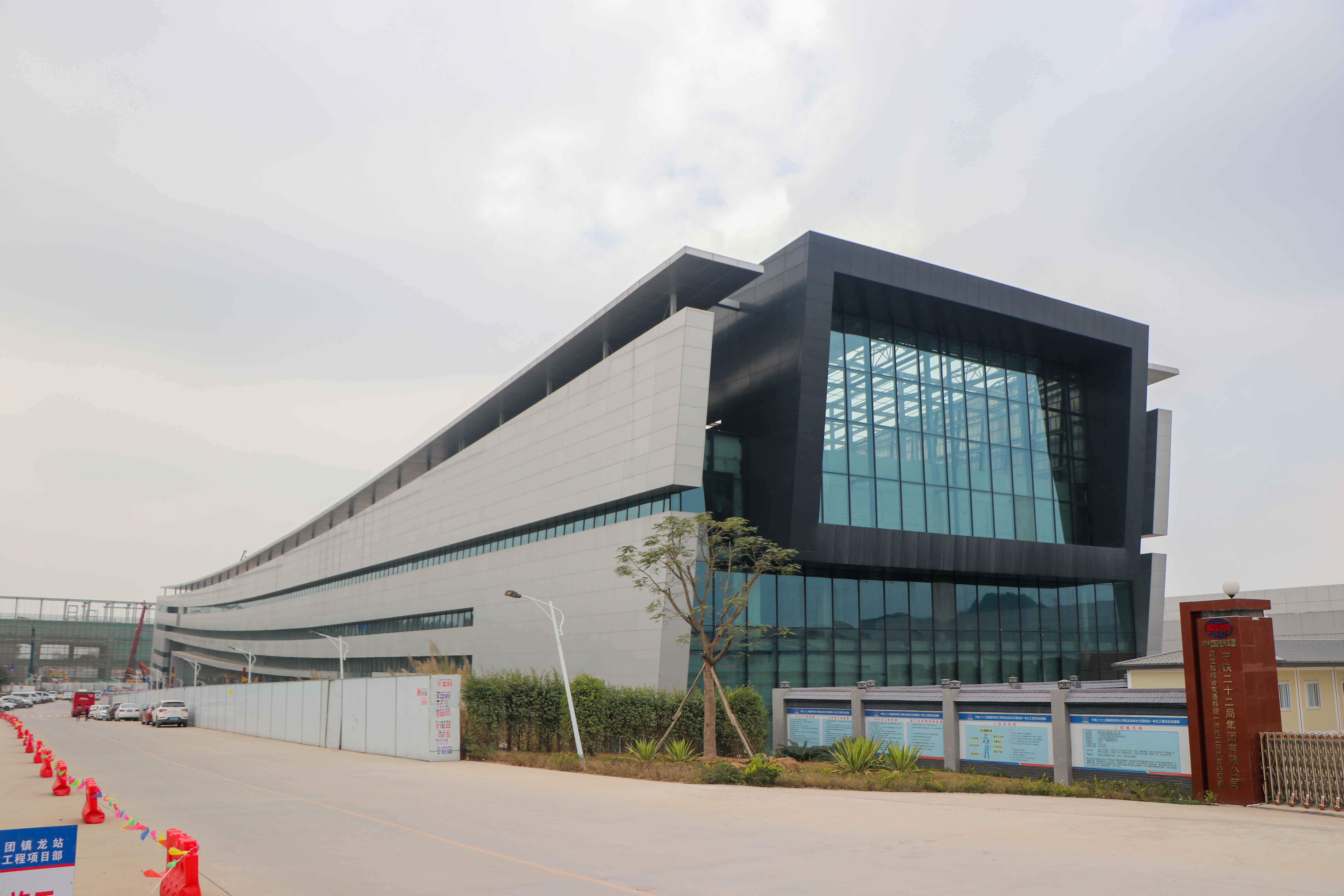 广州地铁镇龙站